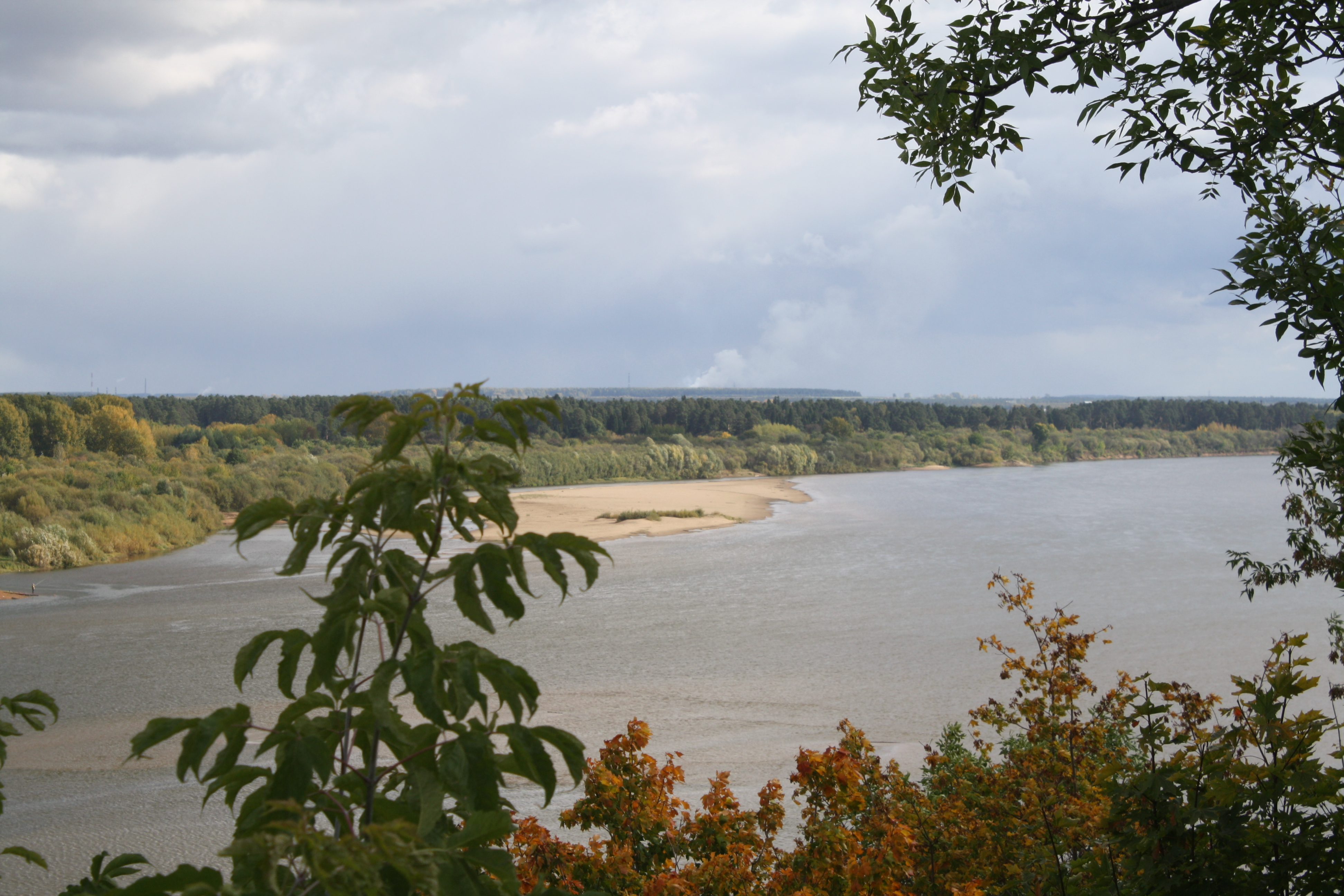 Vyatka river. Kirov. Russia. Река Вятка. Киров. Россия